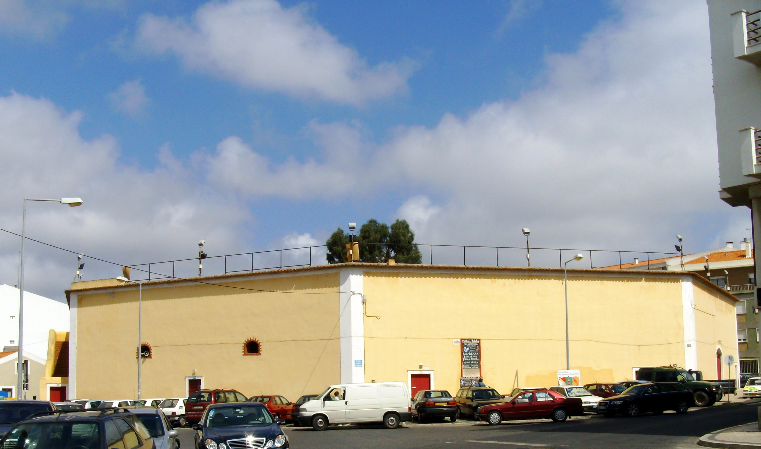 Praça de Toiros, Caldas da Rainha, Portugal.